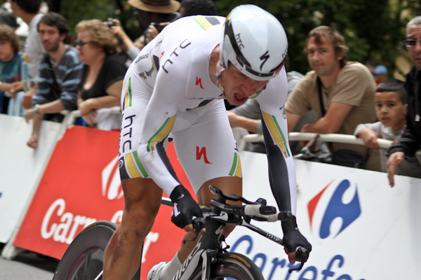 Tony Martin lors de la 20e étape du Tour de France 2011 qu'il remporta.